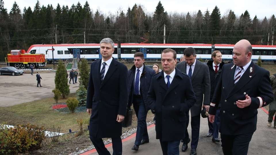 Дмитрий Медведев после осмотра электропоезда ЭГ2Тв на станции Бекасово-Сортировочная